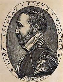 Rémy Belleau frontispiece